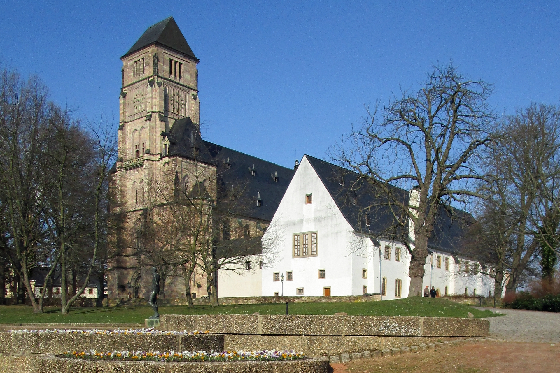 Die ehemalige Klosteranlage St. Marien mit Schloßkirche und Schloßbergmuseum in Chemnitz im Jahr 2015.